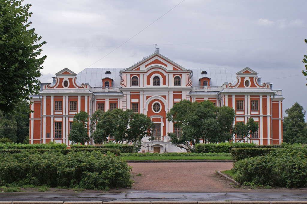 Кикины палаты в Санкт-Петербурге (Ставропольская ул., 9)